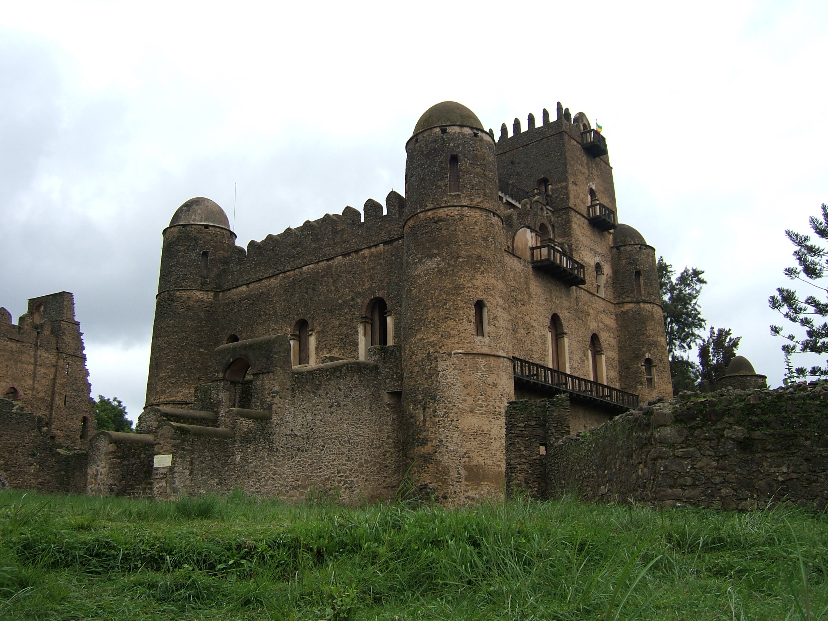 Fasilidas' palace, Gonder